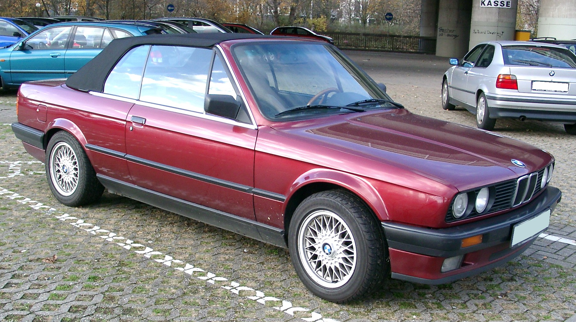 BMW E30 Cabrio